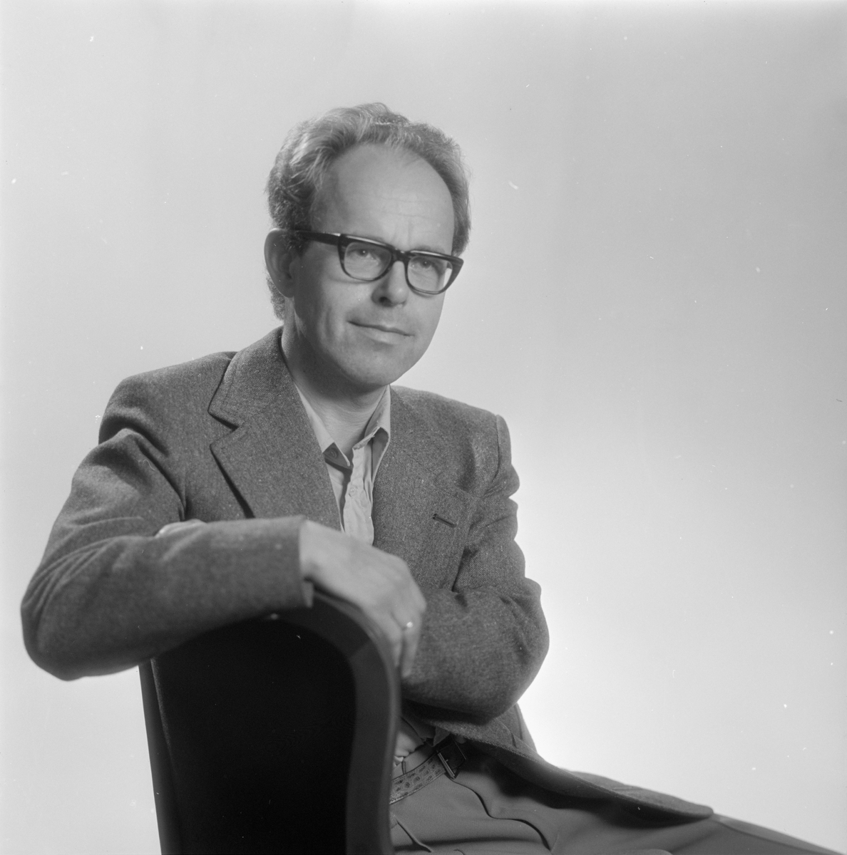 Professor og forfatter Geir Kjetsaa (1937-2008), fotografert av Leif Ørnelund 04.08.1977.